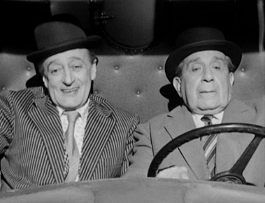 Toto Vittorio e la dottoressa